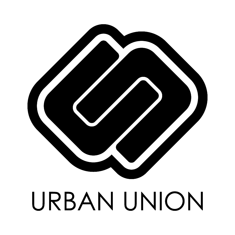 パルクールチーム 「URBAN UNION」のlogoマーク